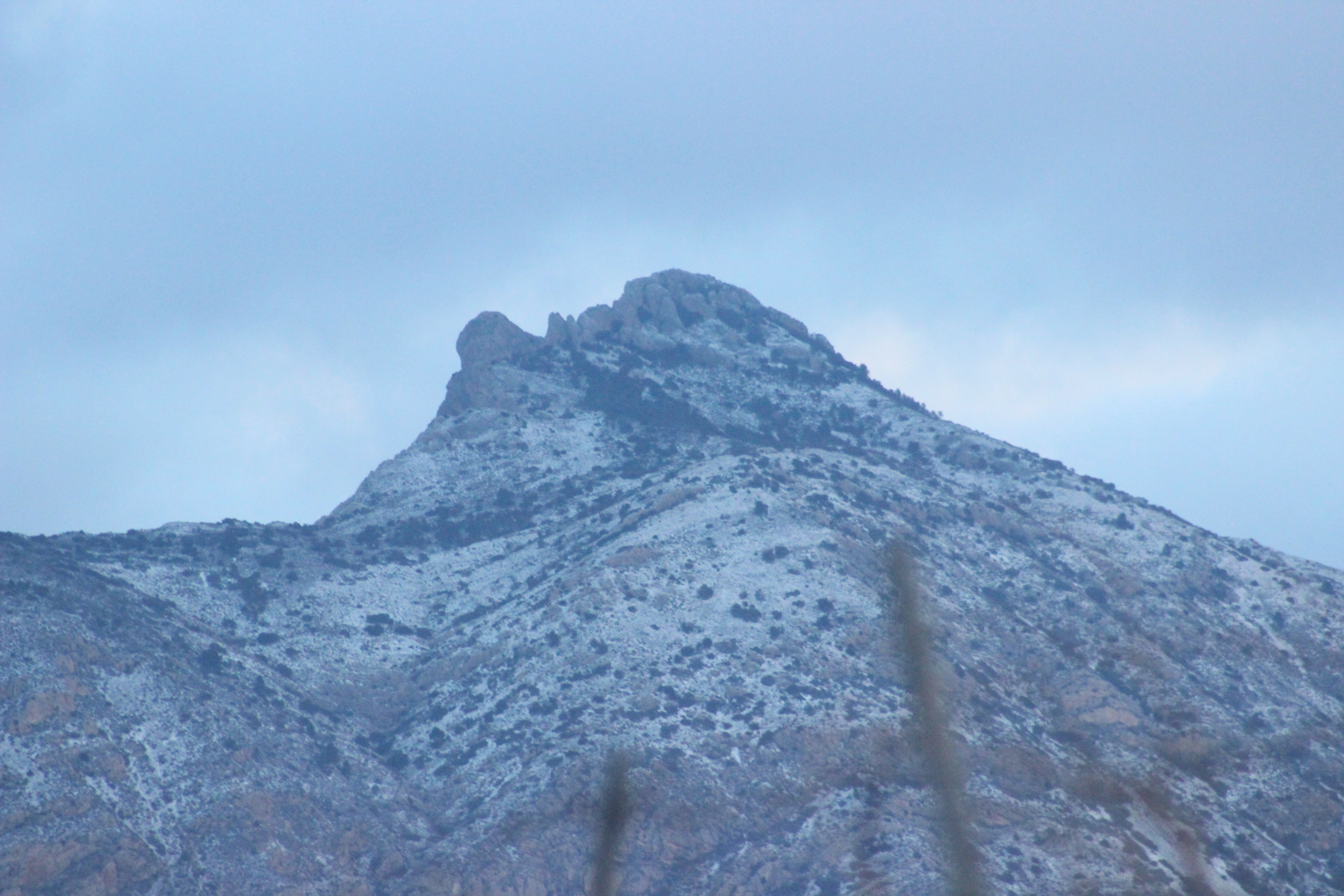 Sierra del Maigmó, vista desde Agost, cubierta de nieve